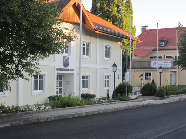 Facciata del comune di Perwang